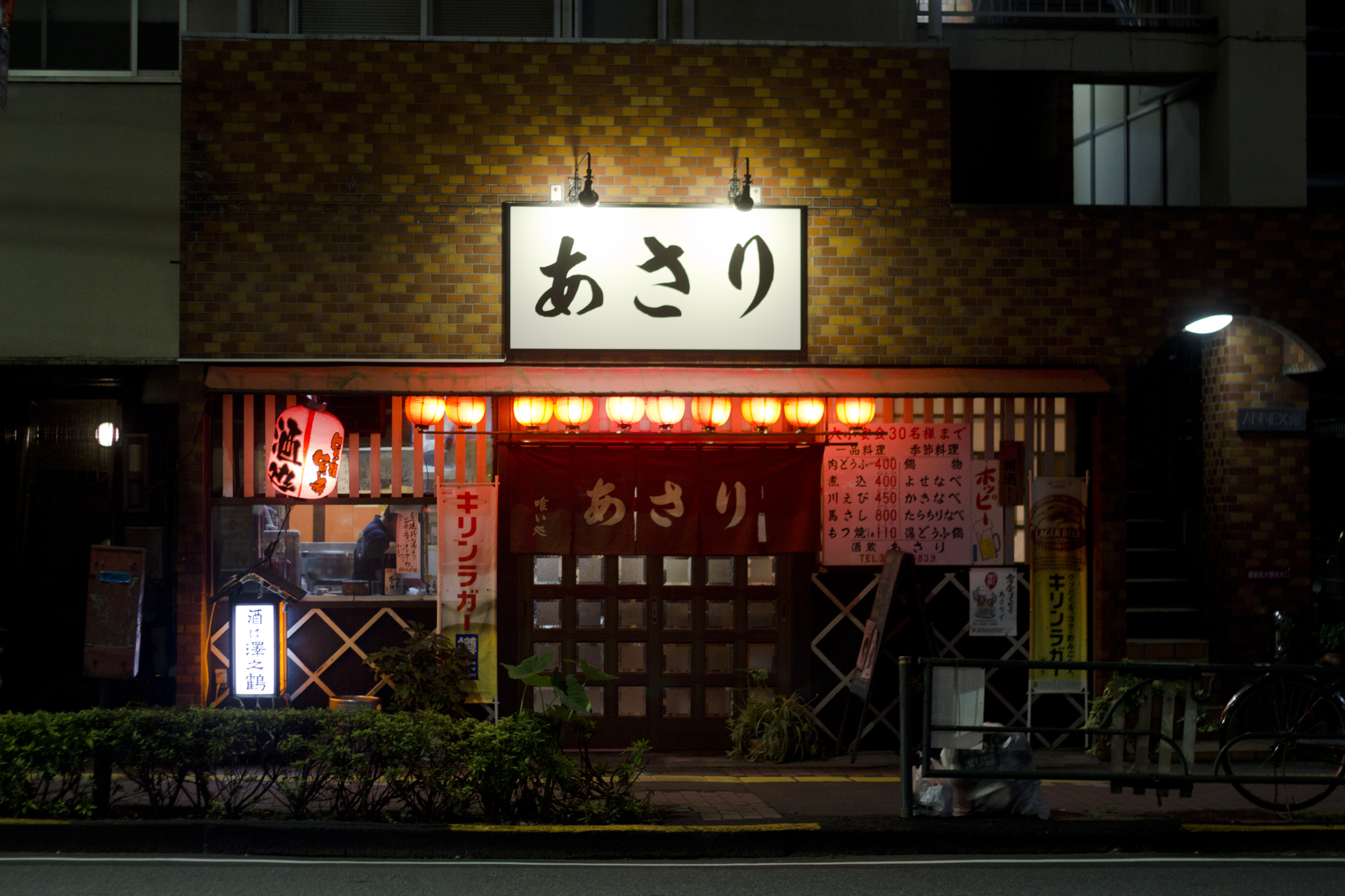 Izakaya "Asari" in Gotanda, Tokyo.